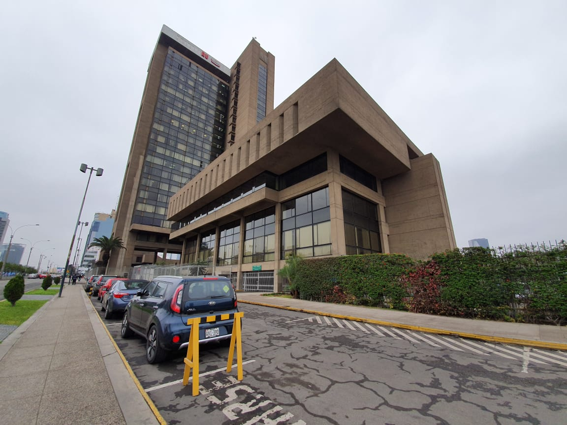 Edificio